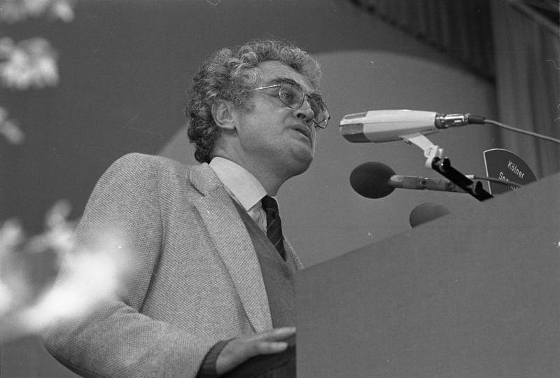 28.2.1983 SPD-Wahlkundgebung mit Kanzler-Kandidat Dr. Hans-Jochen Vogel in der Kölner Sporthalle